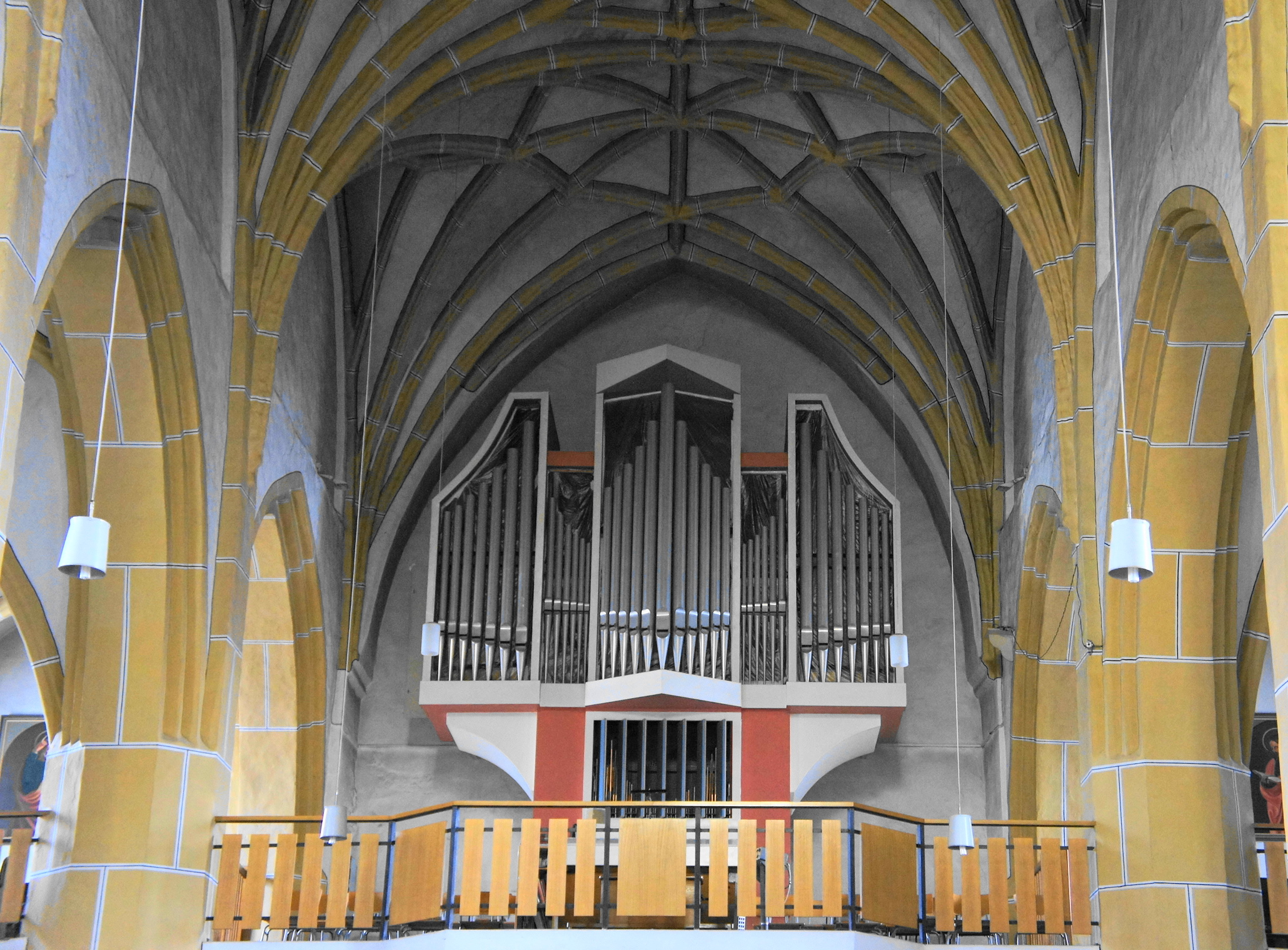 Katoholische Pfarrkirche "St. Mariä Himmelfahrt" in Wittichenau. Bereits um 1000 soll eine Holzkirche existiert haben, sie wurde 1230 ersetzt, 1429 durch die Hussiten zerstört, dann wieder aufgebaut bis 1440. Danach immer wieder Reparaturen und Erweiterungen, der letzte größere Eingriff in die dreischiffige Hallenkirche erfolgte 1971/72, bei der die Emporeneinbauten, mit Ausnahme der Orgelempore, entfernt wurden. Die zweimanualige mechanische Schleifladenorgel hat 21 Register und wurde 1981 durch Orgelbau Sauer in Frankfurt/Oder errichtet